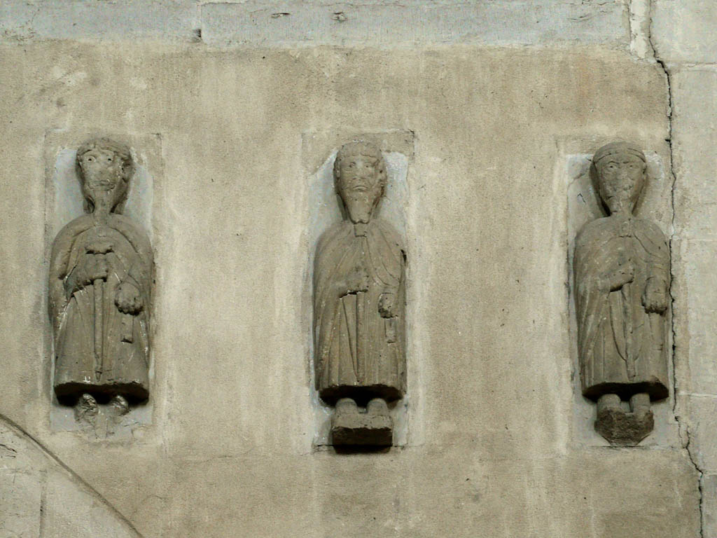 Skulpturen